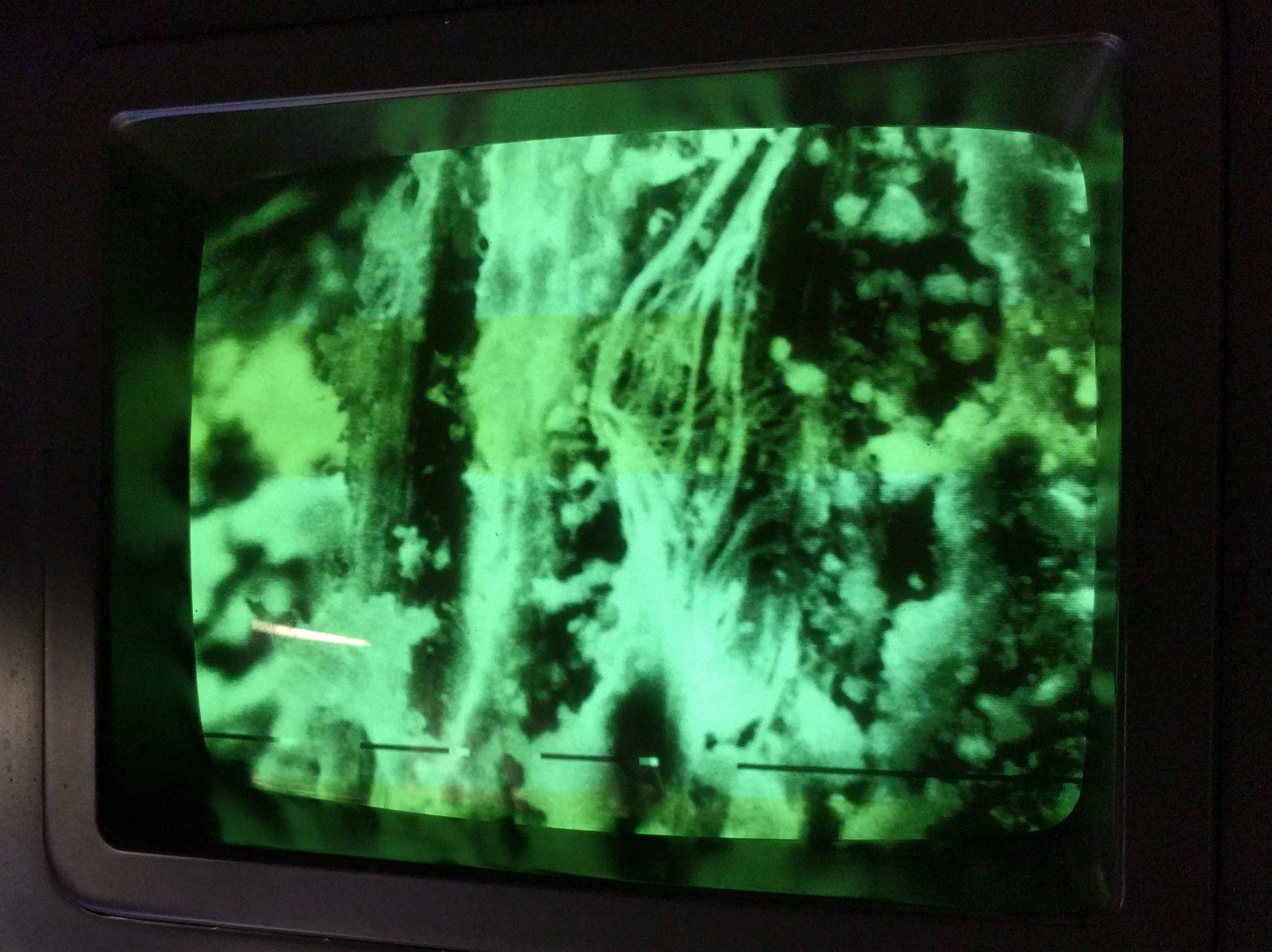 Weißasbestfaser / Chrysotil aus Raumluft gefiltert, ca. 5000-fach vergrößert durch Rasterelektronenmikroskop